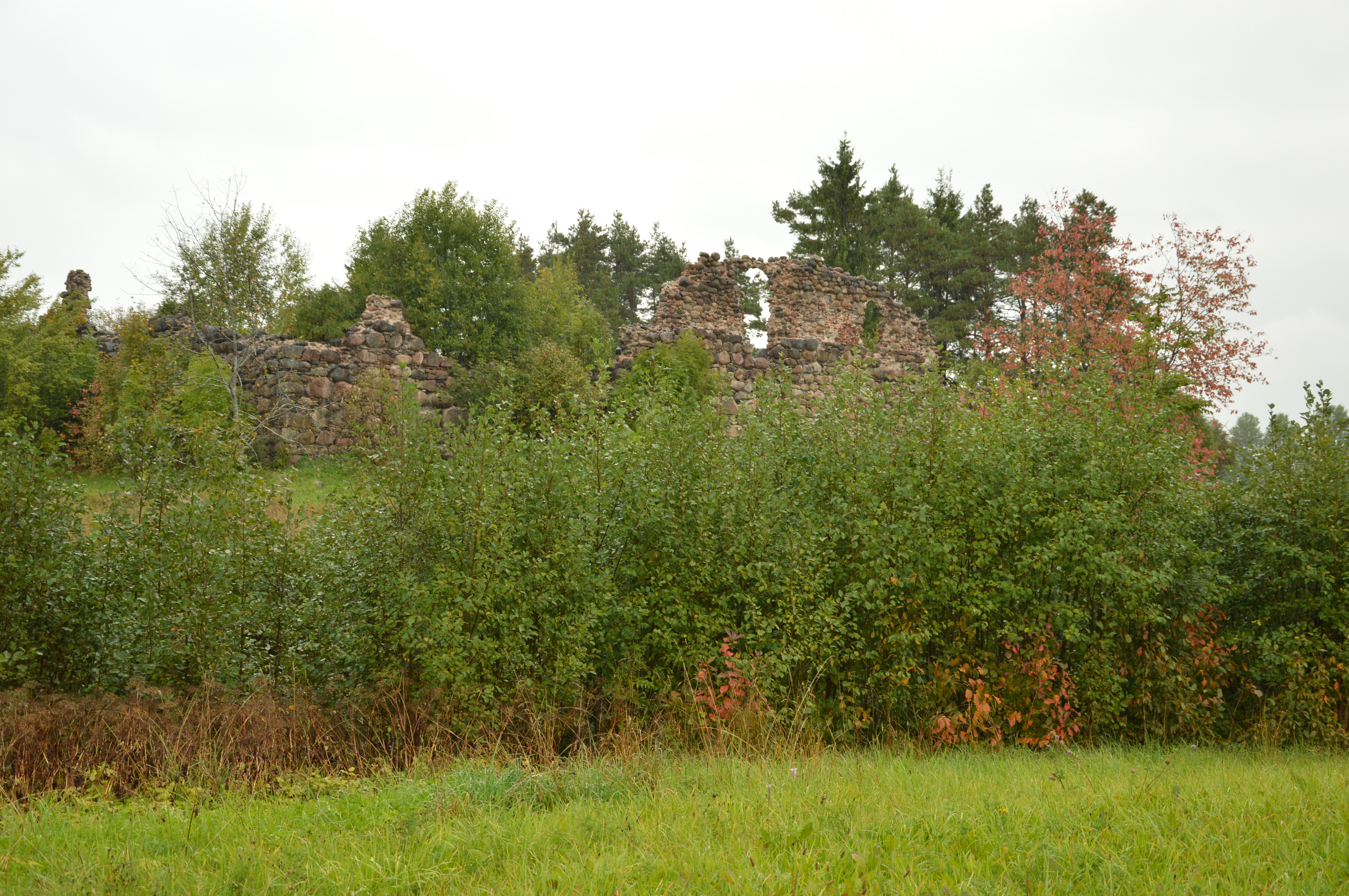 Vana-Pebalgi piiskopilinnus